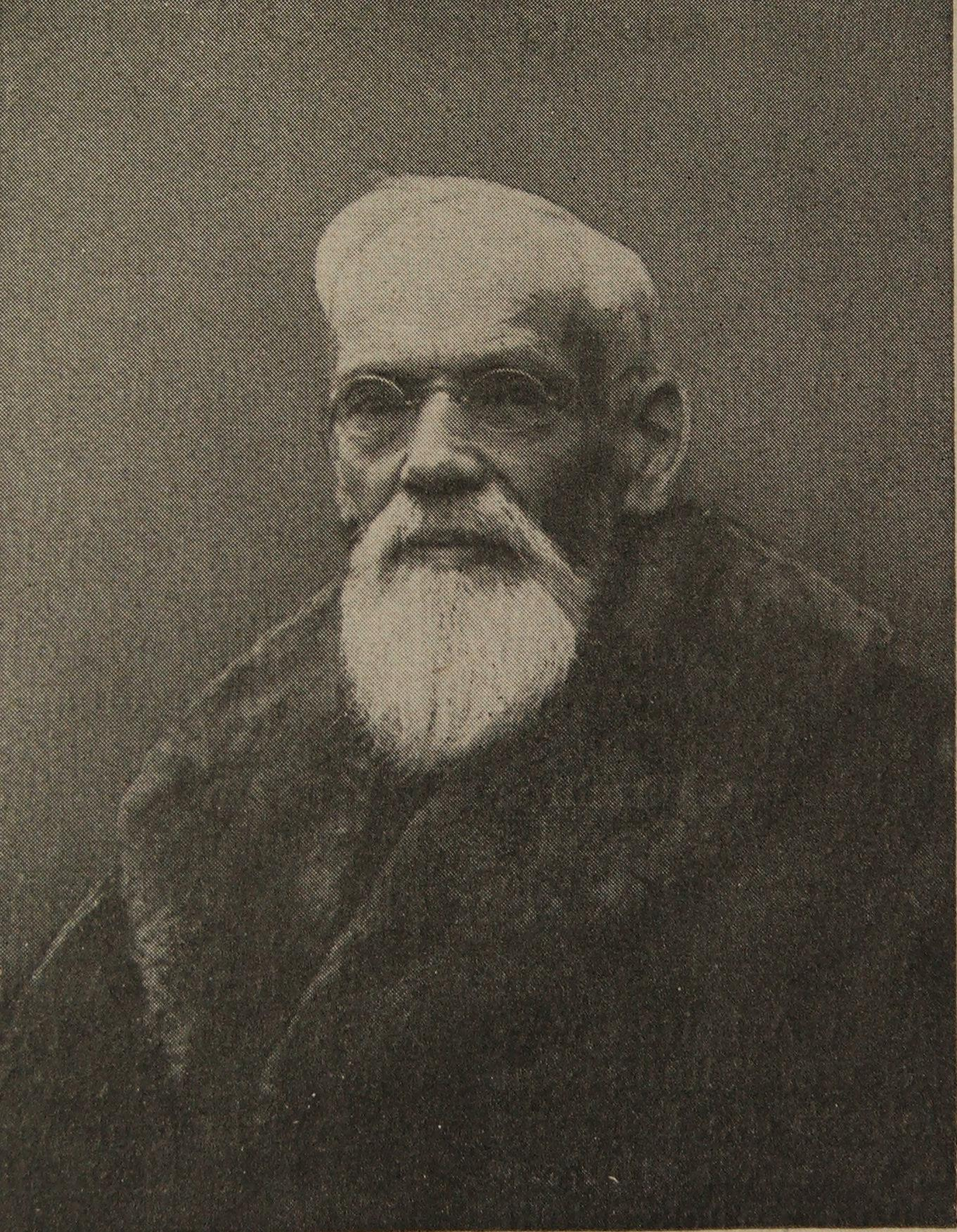 Abbildung von Oberbaudirektor a.D. Hermann Bücking